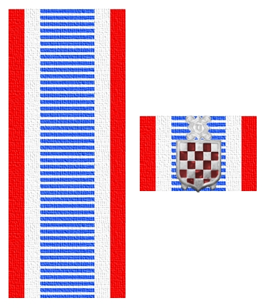 Das kroatische Kriegserinnerungsabzeichen welches nur als Bandorden (mit Spange) zur Verleihung kam.